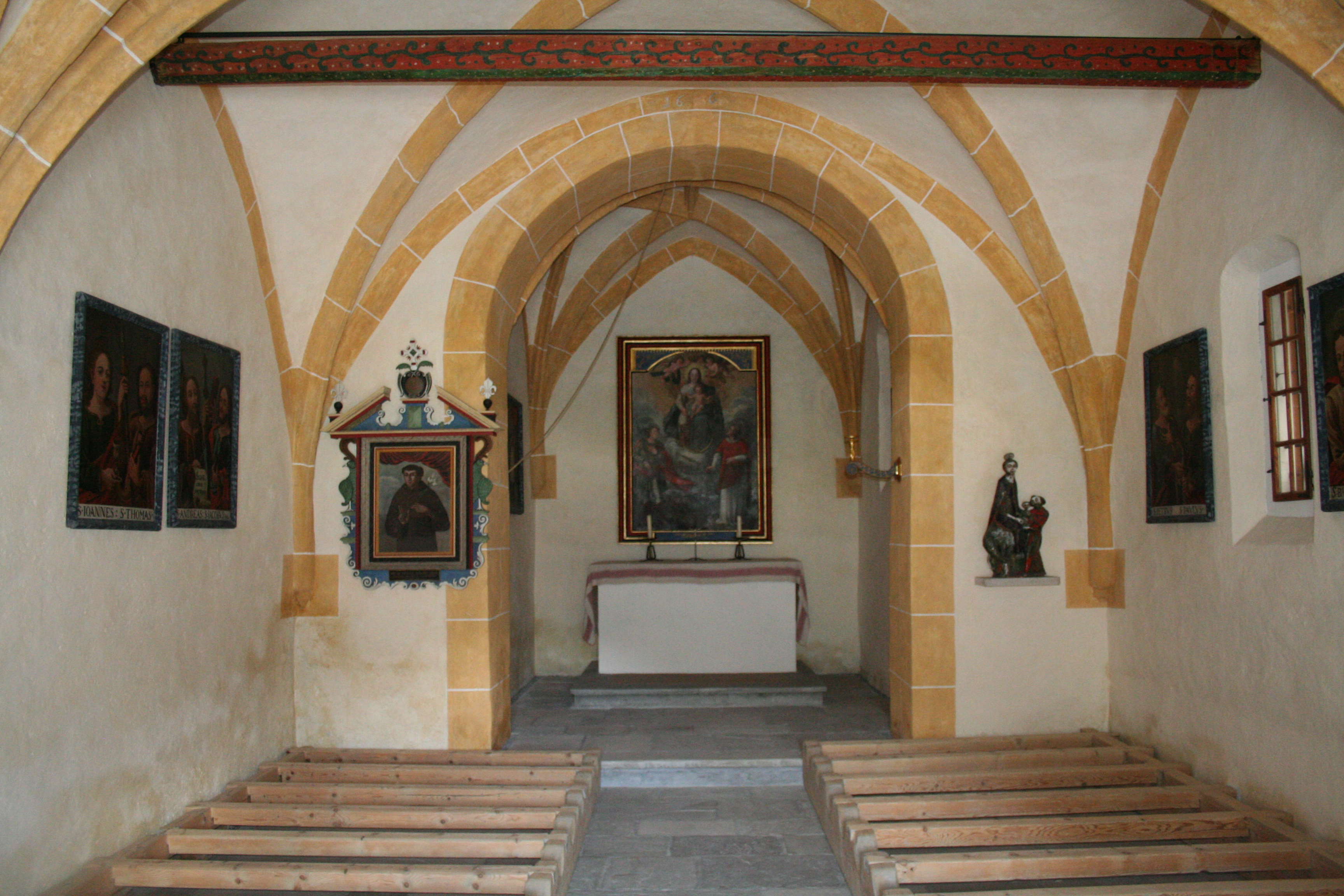 Kapelle St. Cassian Lantsch/Lenz Innenraum